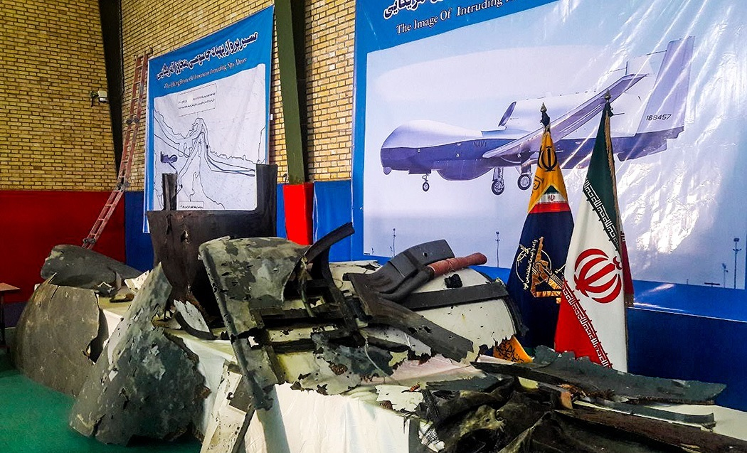 تصویری از باقی‌مانده پهپاد گلوبال هاوک